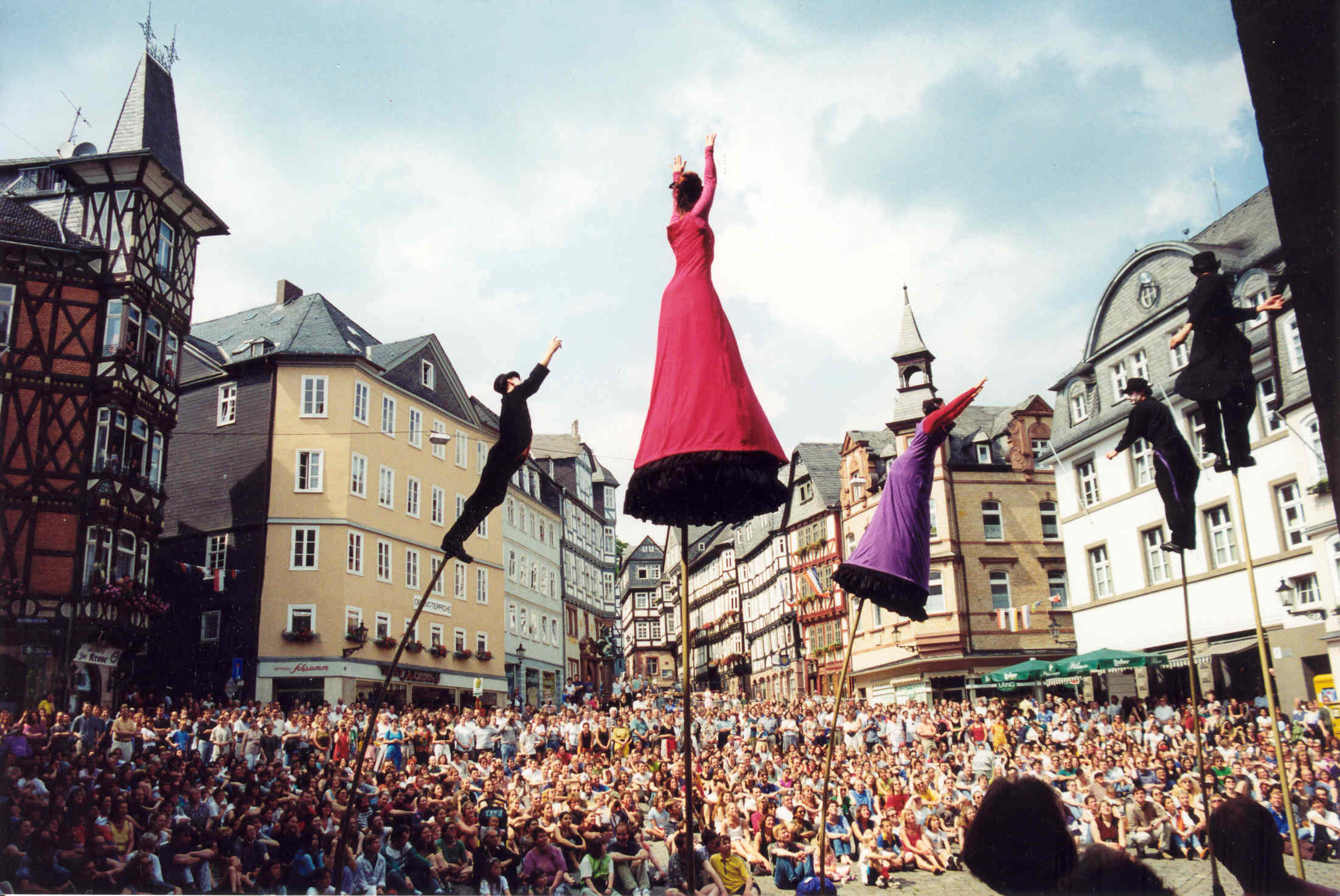 Strange-Fruit-Theater auf dem Marburger Rathausplatz